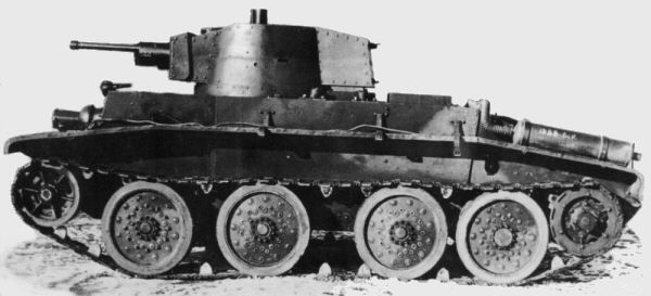 波蘭的10TP坦克